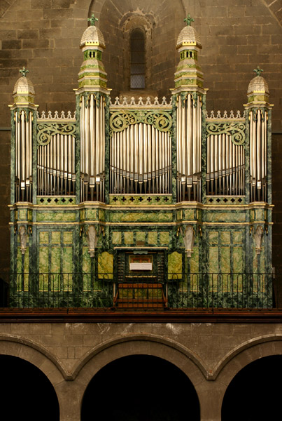 Photographie : Julien TELLIER